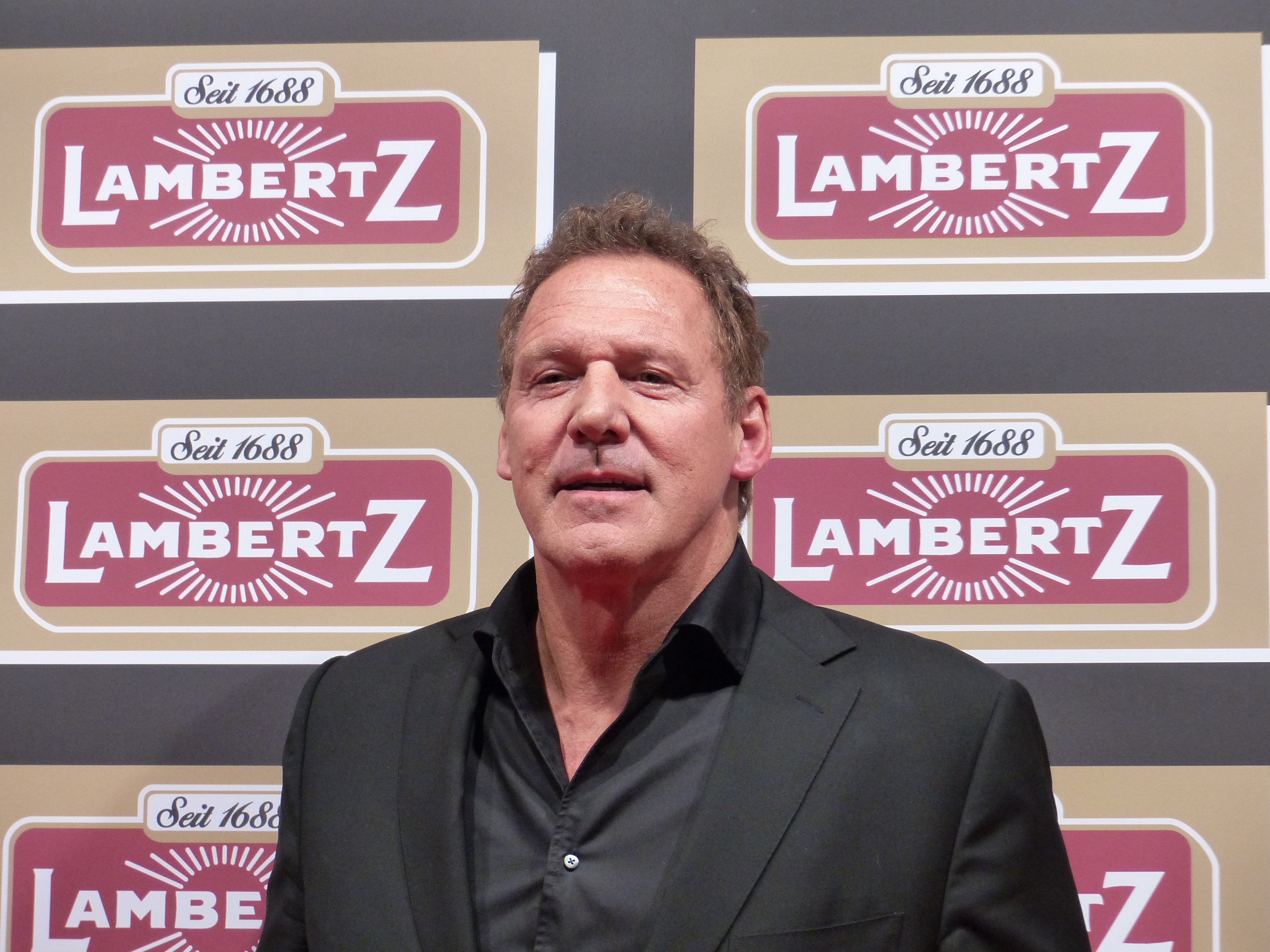 Ralf Möller bei der Lambertz Monday Night, im Februar 2016.